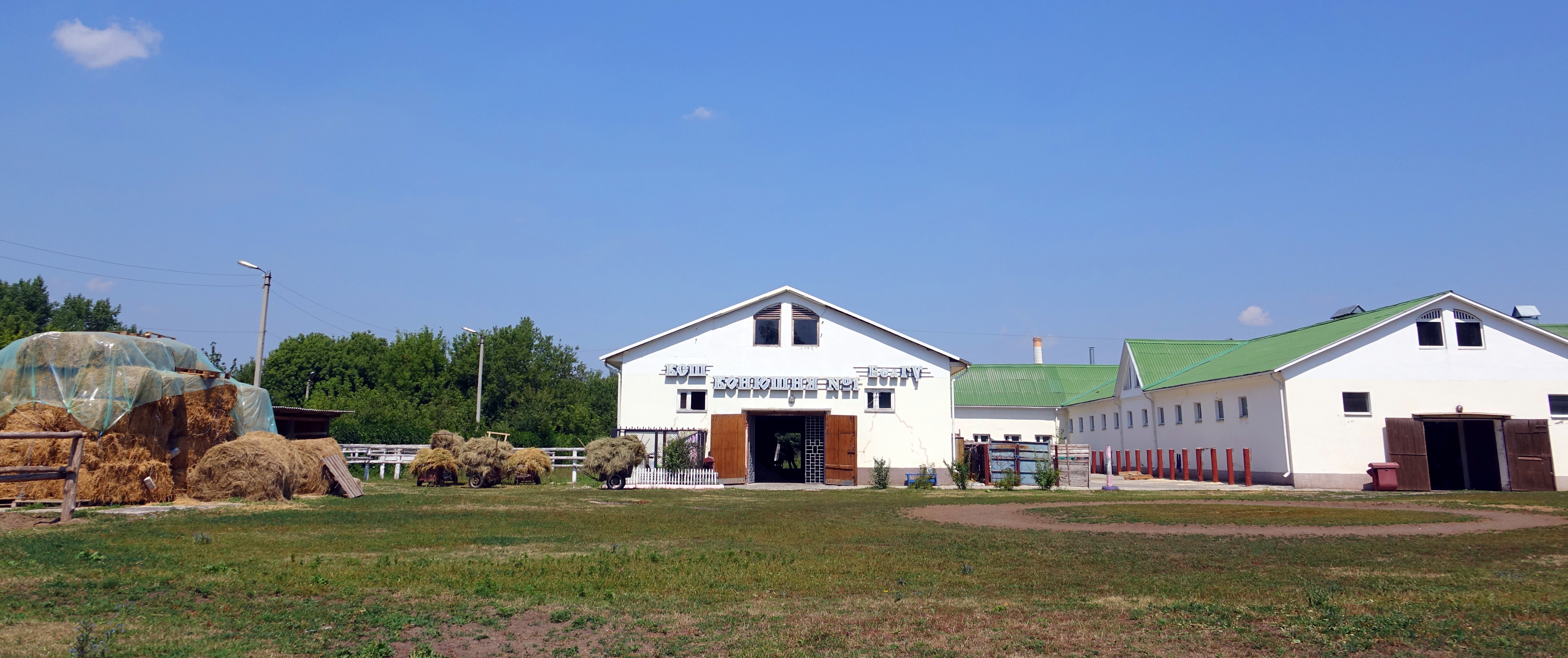 Конноспортивная школа НИУ «БелГУ»